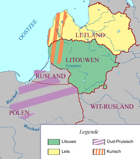 Distributie van Baltische talen. Eigen werk van Robin Hood.